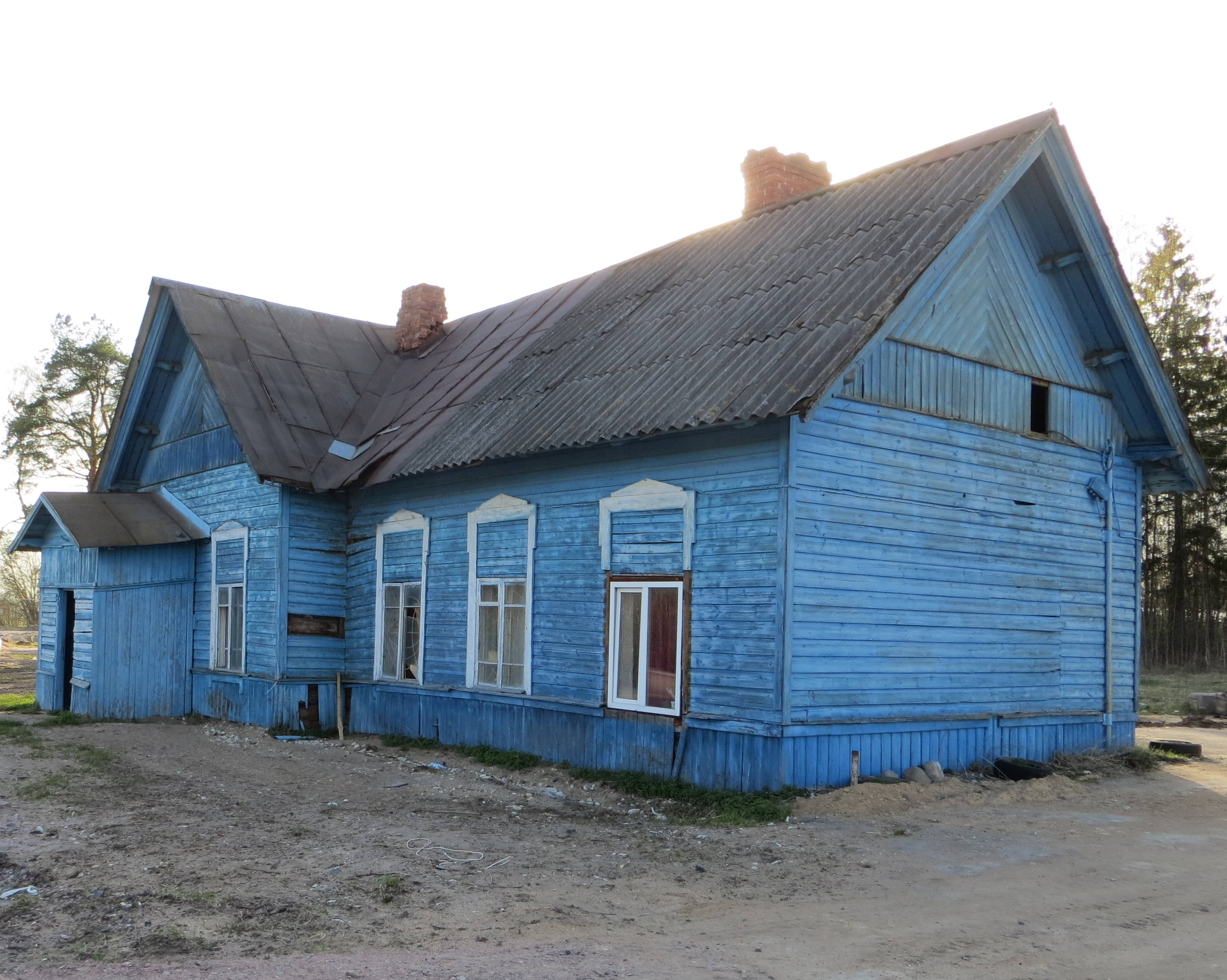 Деревня Лепсари. Здание школы.